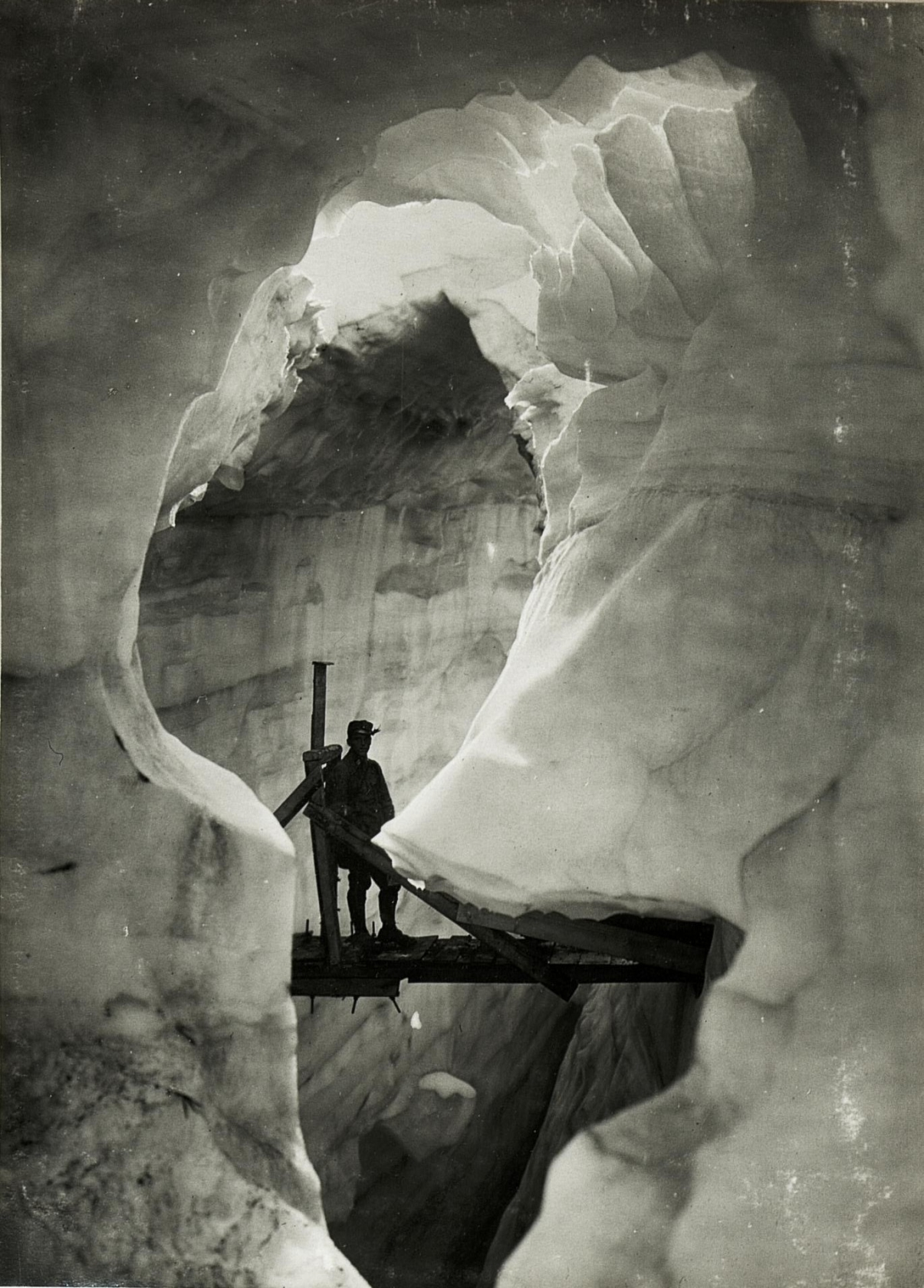 Marmolata: "Seufzerbrücke" Motiv aus der Eismeerstellung.